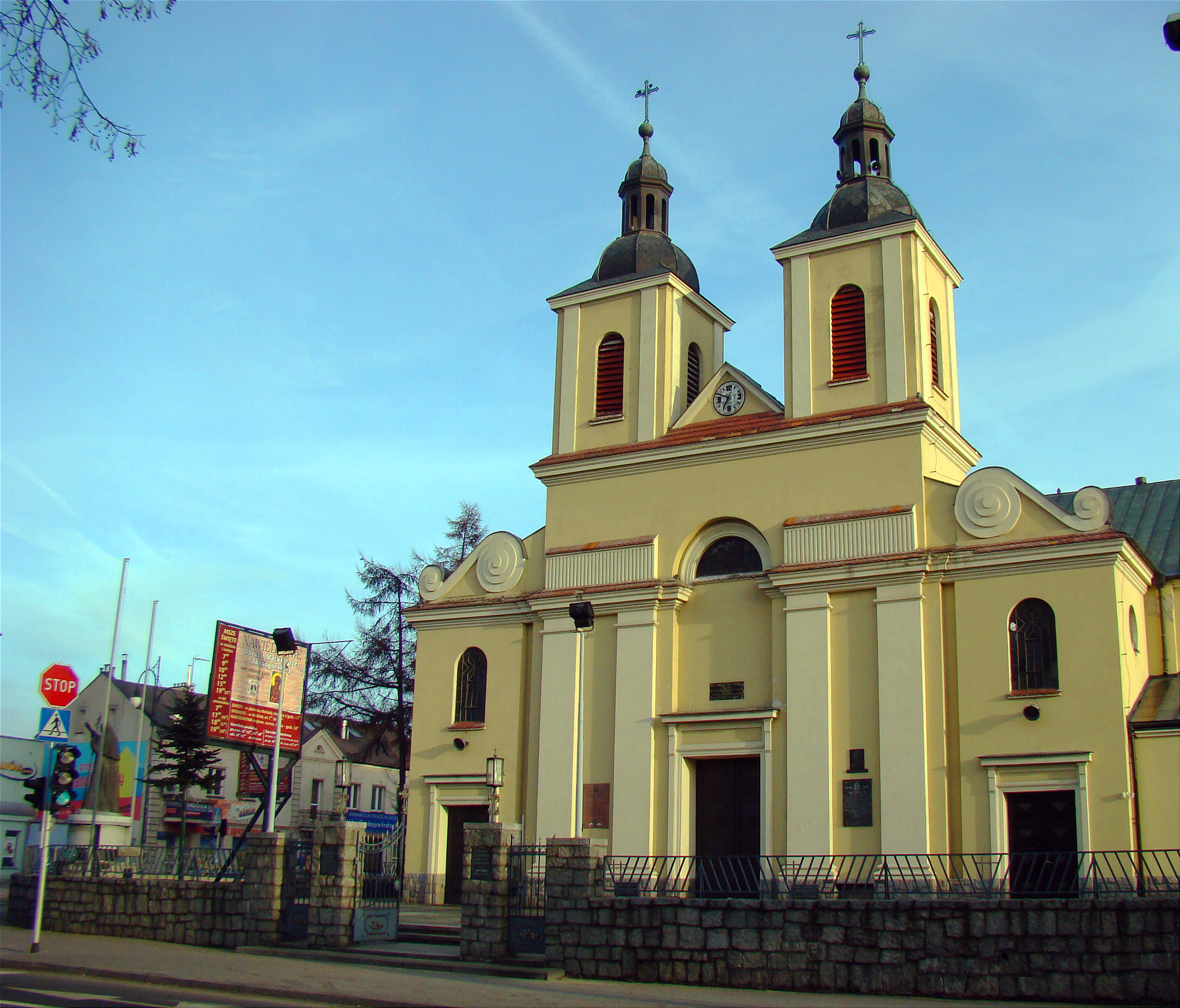 Kościół pw. św. Rafała i Michała w Aleksandrowie Łódzkim (powiat zgierski, województwo łódzkie), Polska